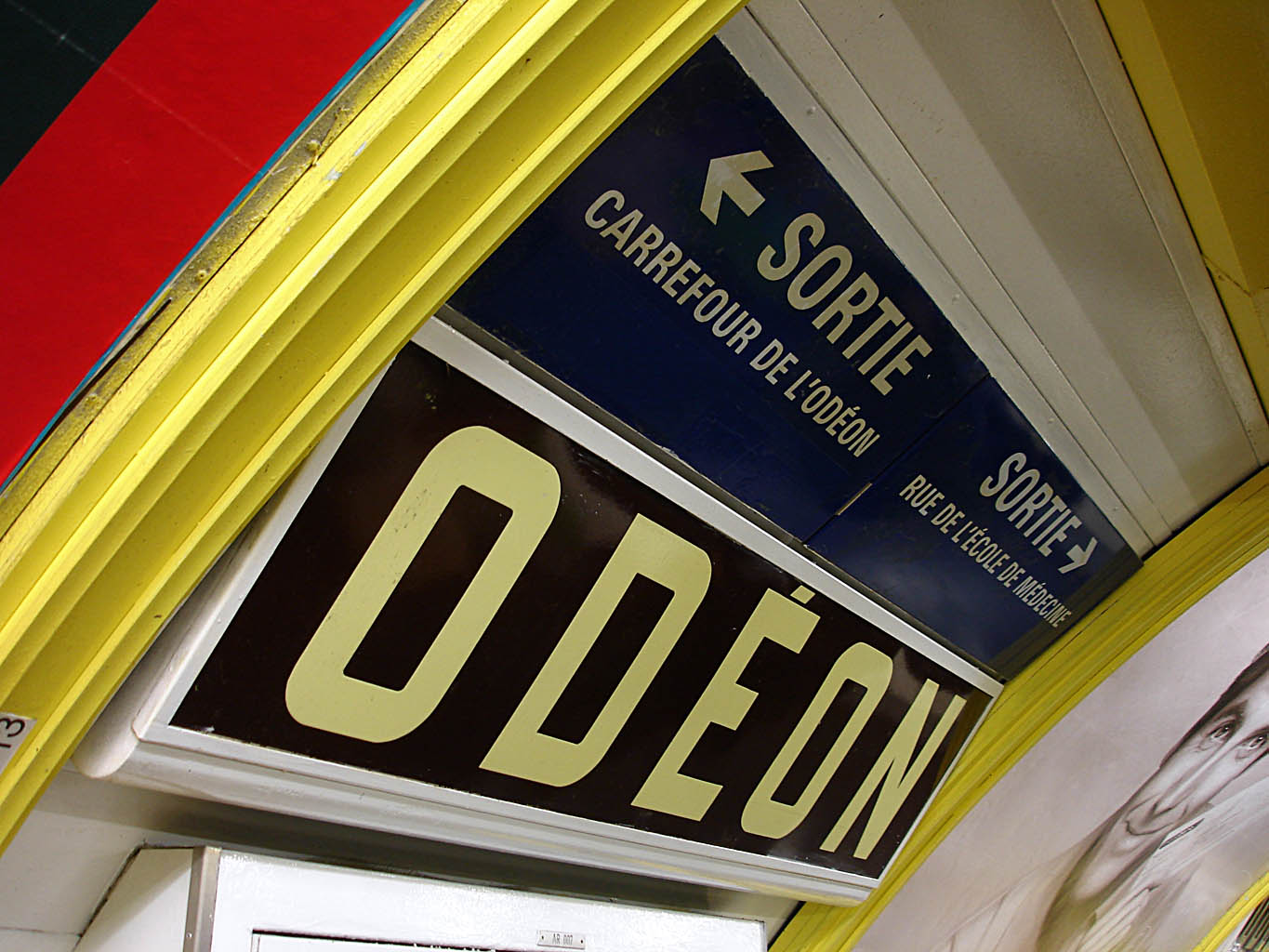 Station Odéon, de la ligne 4 du métro de Paris, France.